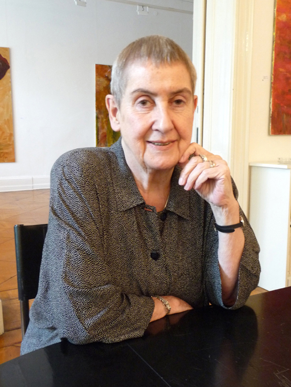 Eva Poll, Aufnahme vom 27. Mai 2009